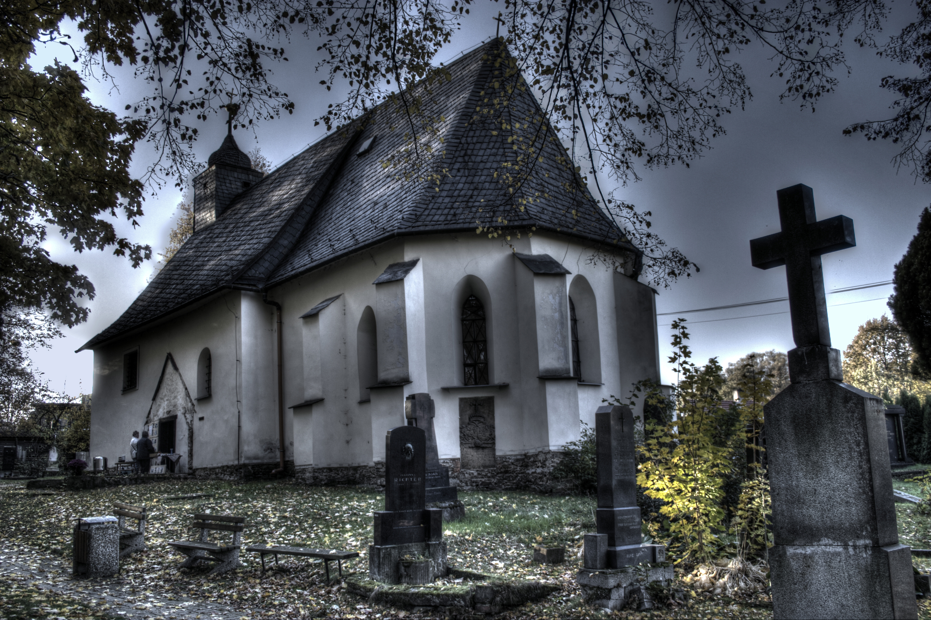 Kostel Navštívení P. Marie (Deštné), Deštné